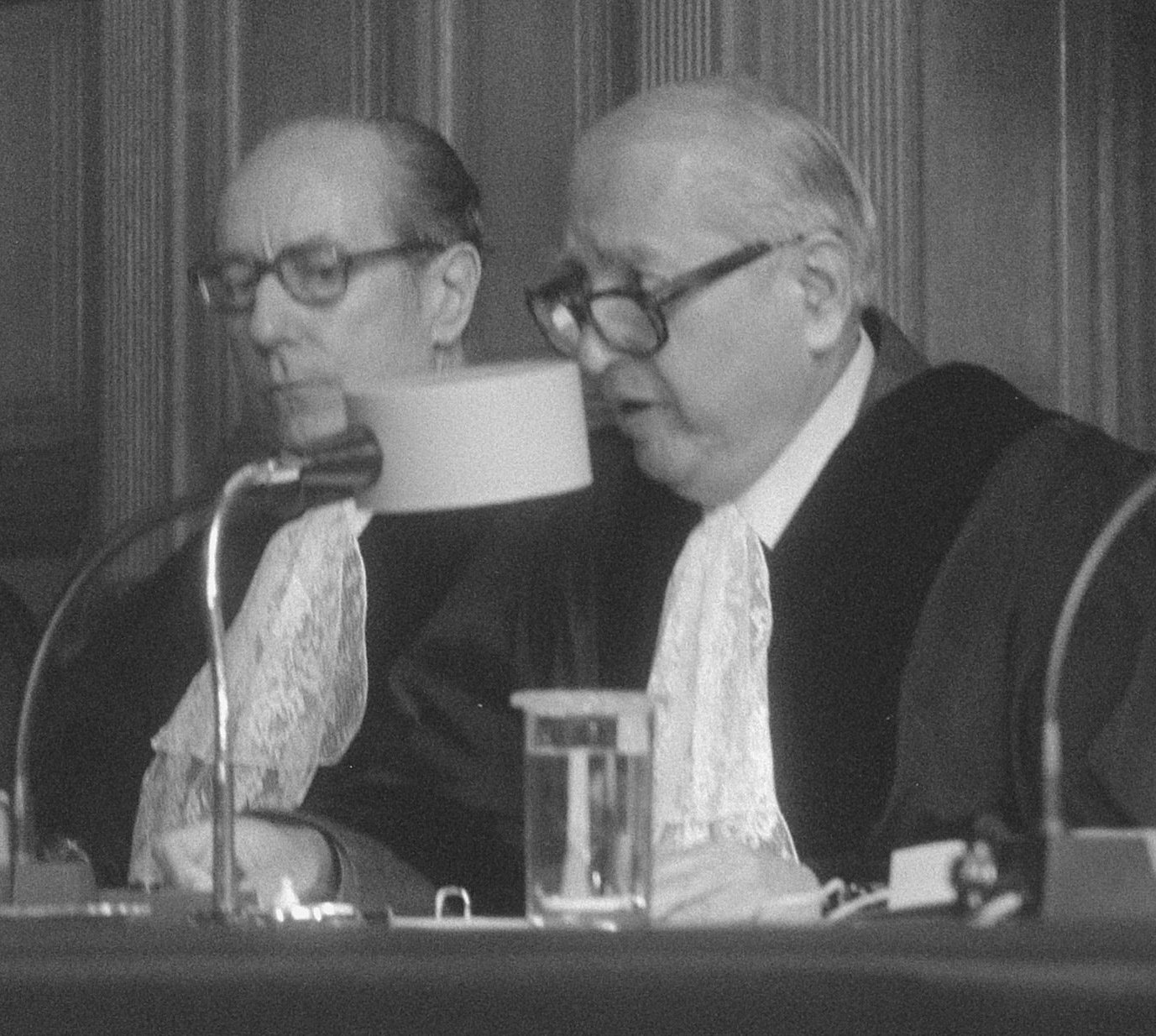 Collectie / Archief : Fotocollectie Anefo Reportage / Serie : [ onbekend ] Beschrijving : Uitspraak Internationaal Gerechtshof in Den Haag in zaak Nicaragua tegen Verenigde Staten, Ruda, de Lacharriere, Nagendra Singh en Lac Datum : 27 juni 1986 Locatie : Den Haag, Zuid-Holland Trefwoorden : gerechtshoven, uitspraken Persoonsnaam : Nagendra Singh, Ruda Fotograaf : Gerrits, Roland / Anefo Auteursrechthebbende : Nationaal Archief Materiaalsoort : Negatief (zwart/wit) Nummer archiefinventaris : bekijk toegang 2.24.01.05 Bestanddeelnummer : 933-6997